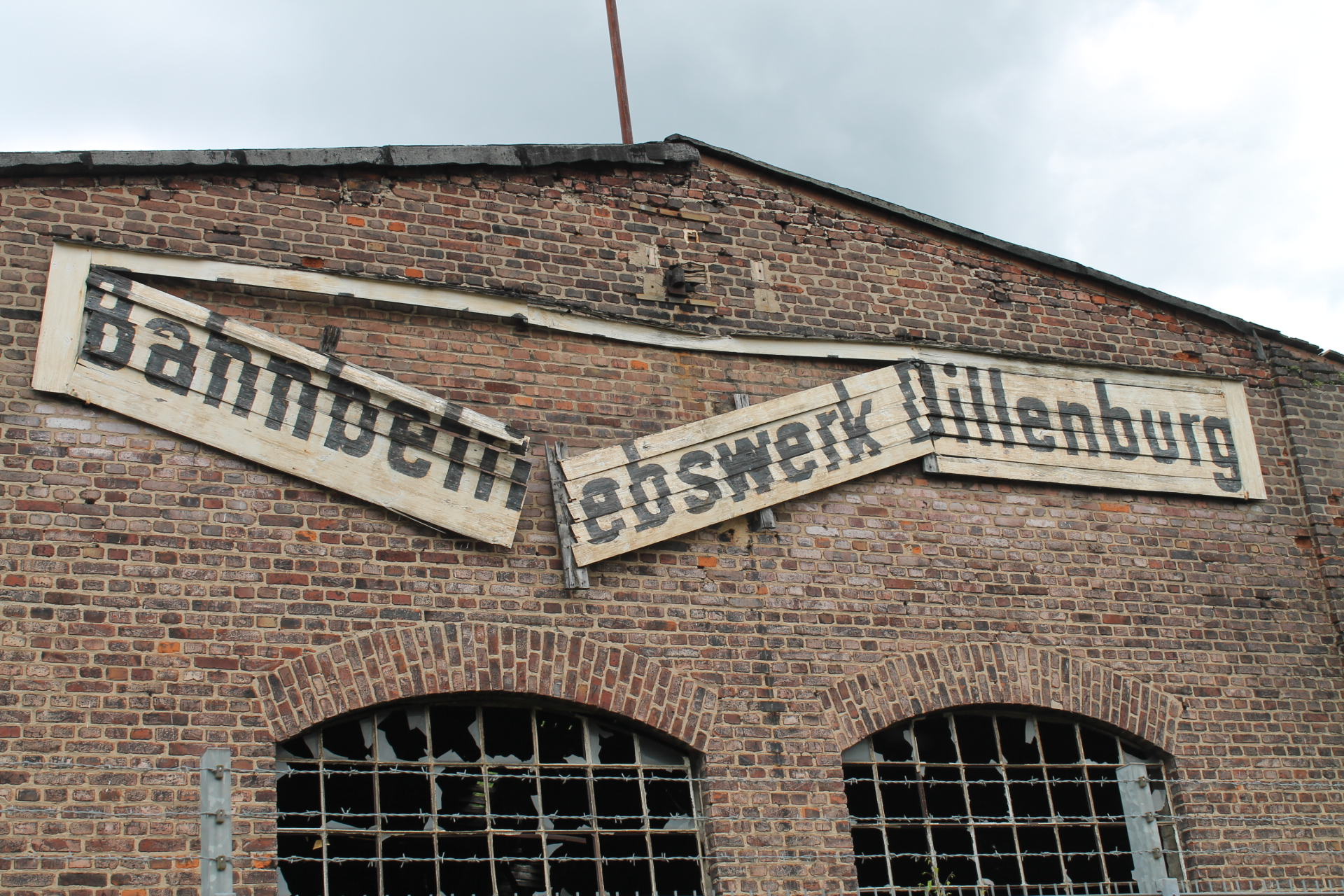 Schild Bahnbetriebswerk Dillenburg 2013, (Alt 2008)